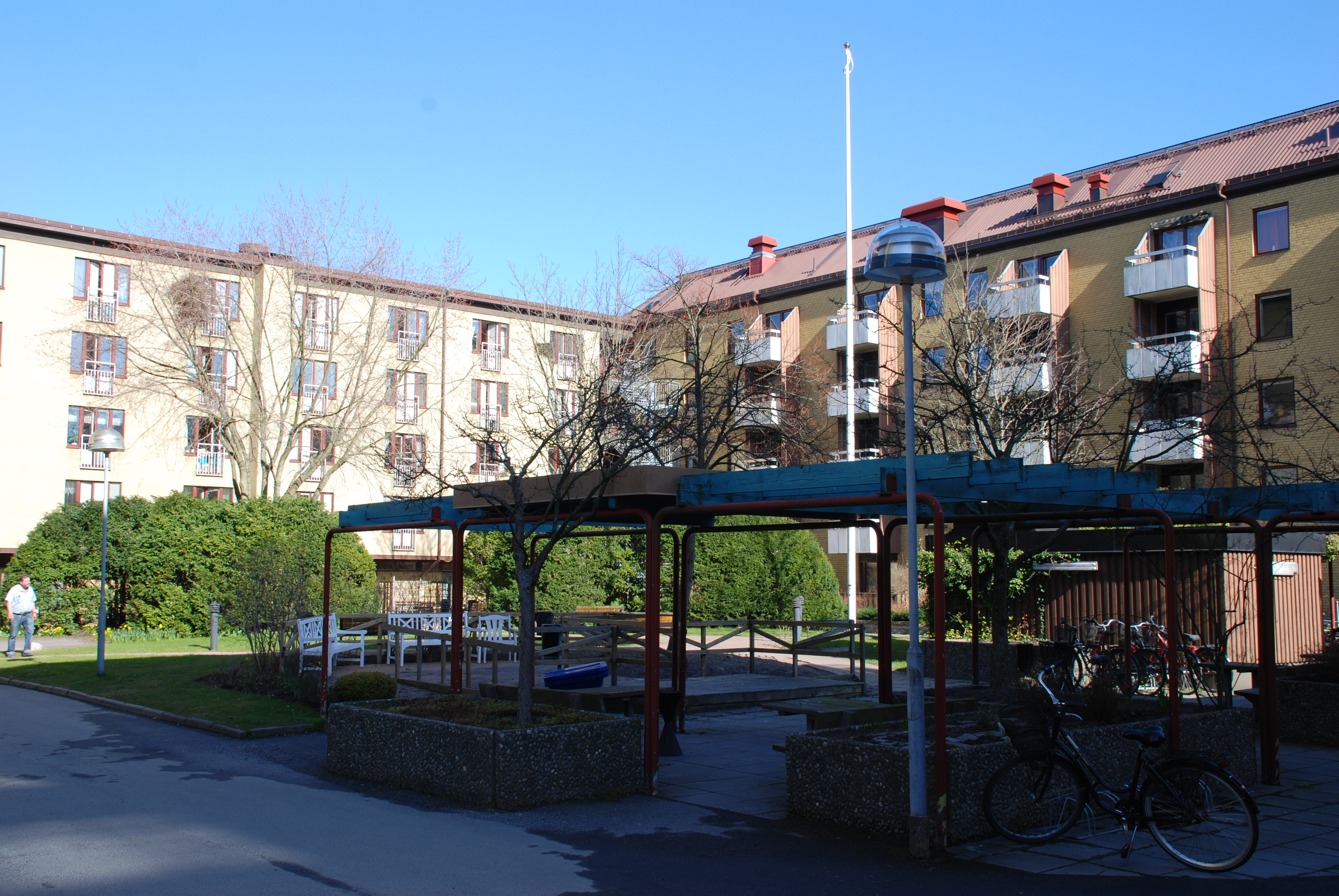 Albotorget i stadsdelen Annedal i Göteborg.